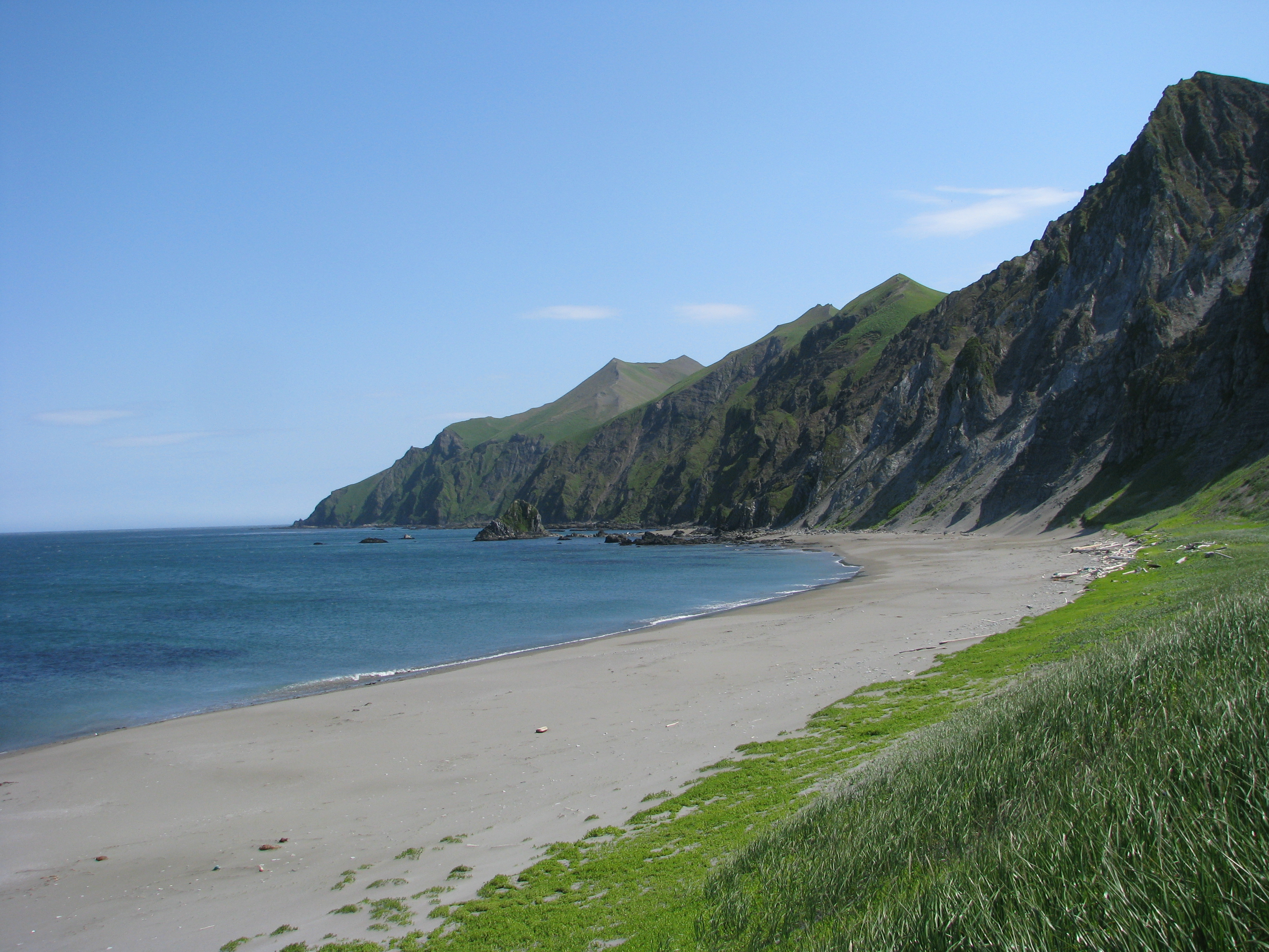 Командорский заповедник, Алеутский район, Медный остров. Участок берега с File:О. Медный 2354.JPG This image is related to the protected area of Russia number 4100007